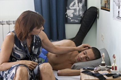 סצינה מהסרט "החיים בינתיים" 2